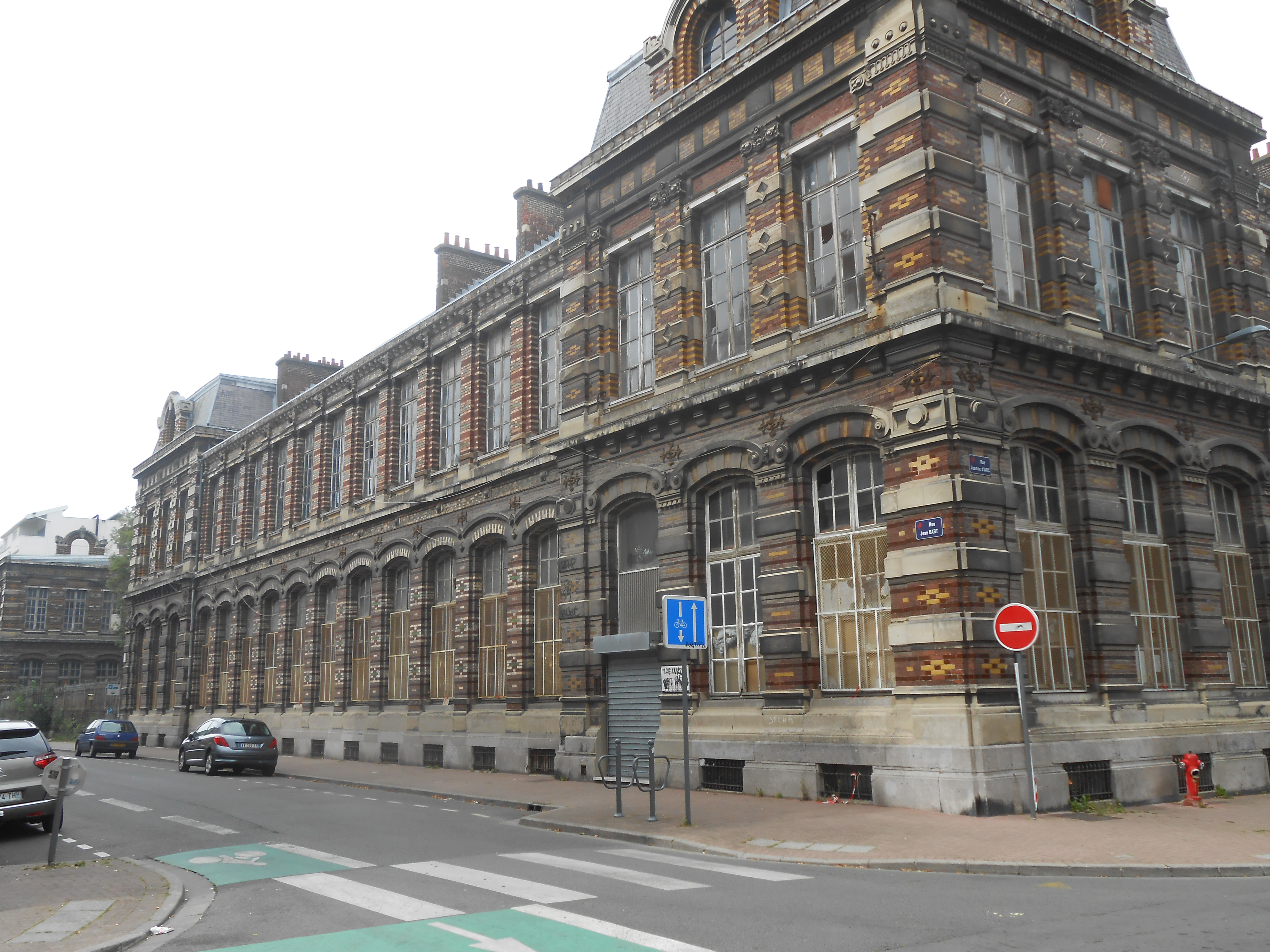 Université de Lille, facultés rue Jean Bart, F-59000 Lille, France